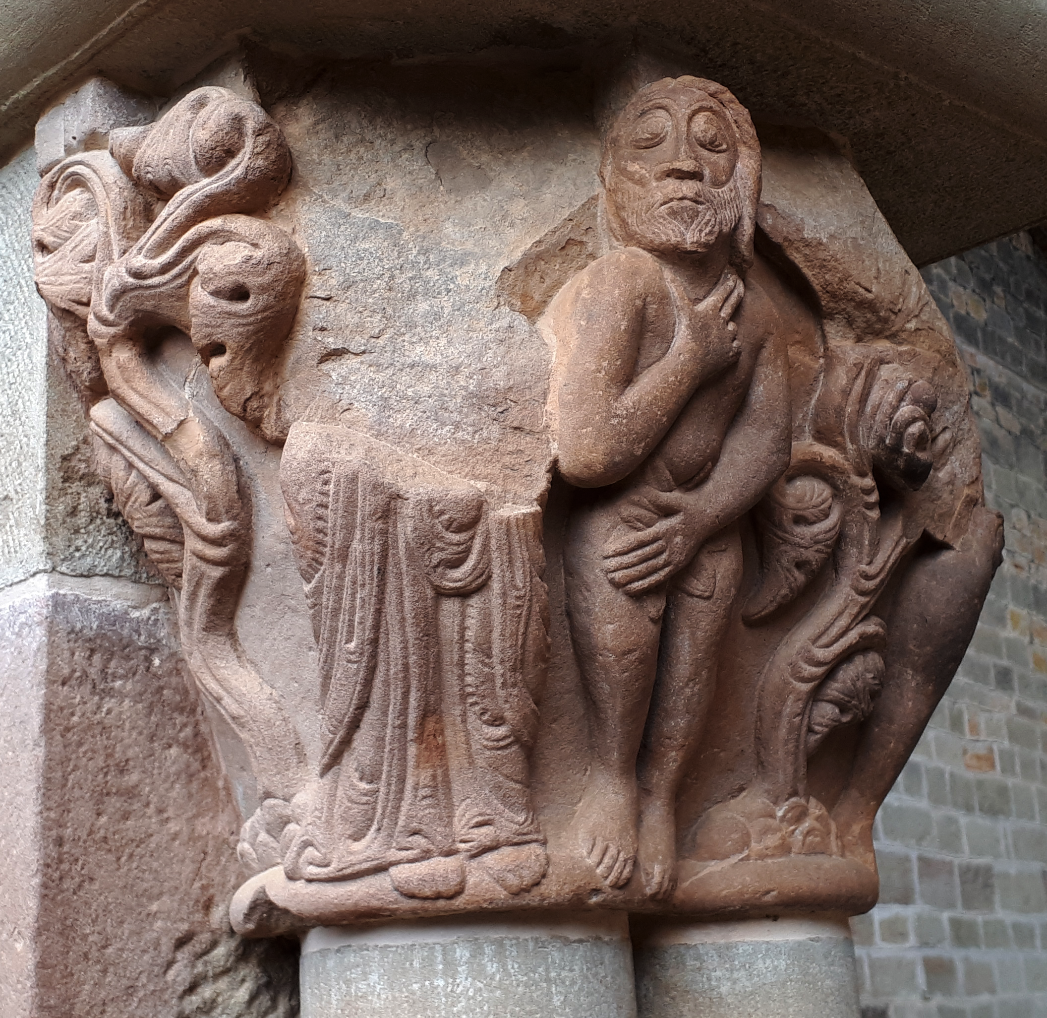 Capitel del siglo XII representando la vergüenza, mediante la expulsión de Adán del Edén. Situado en el claustro del Monasterio viejo de San Juan de la Peña, en Botaya (Aragón - España).